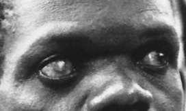 River blindness